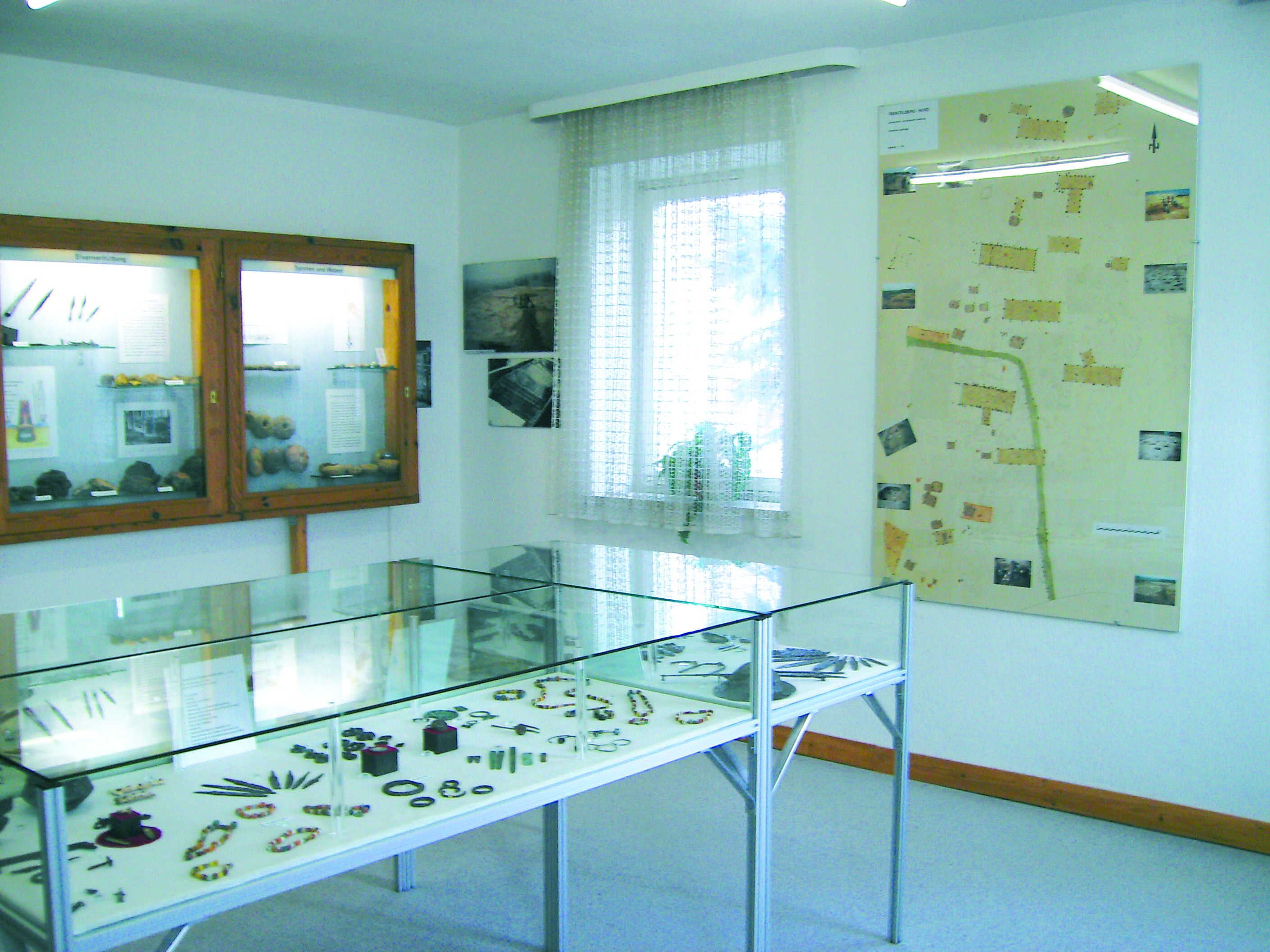 Eindrucksvolle Exponate und Modelle, mit wertvollem historischen Hintergrund, werden in den Räumen des Museums ausgestellt.